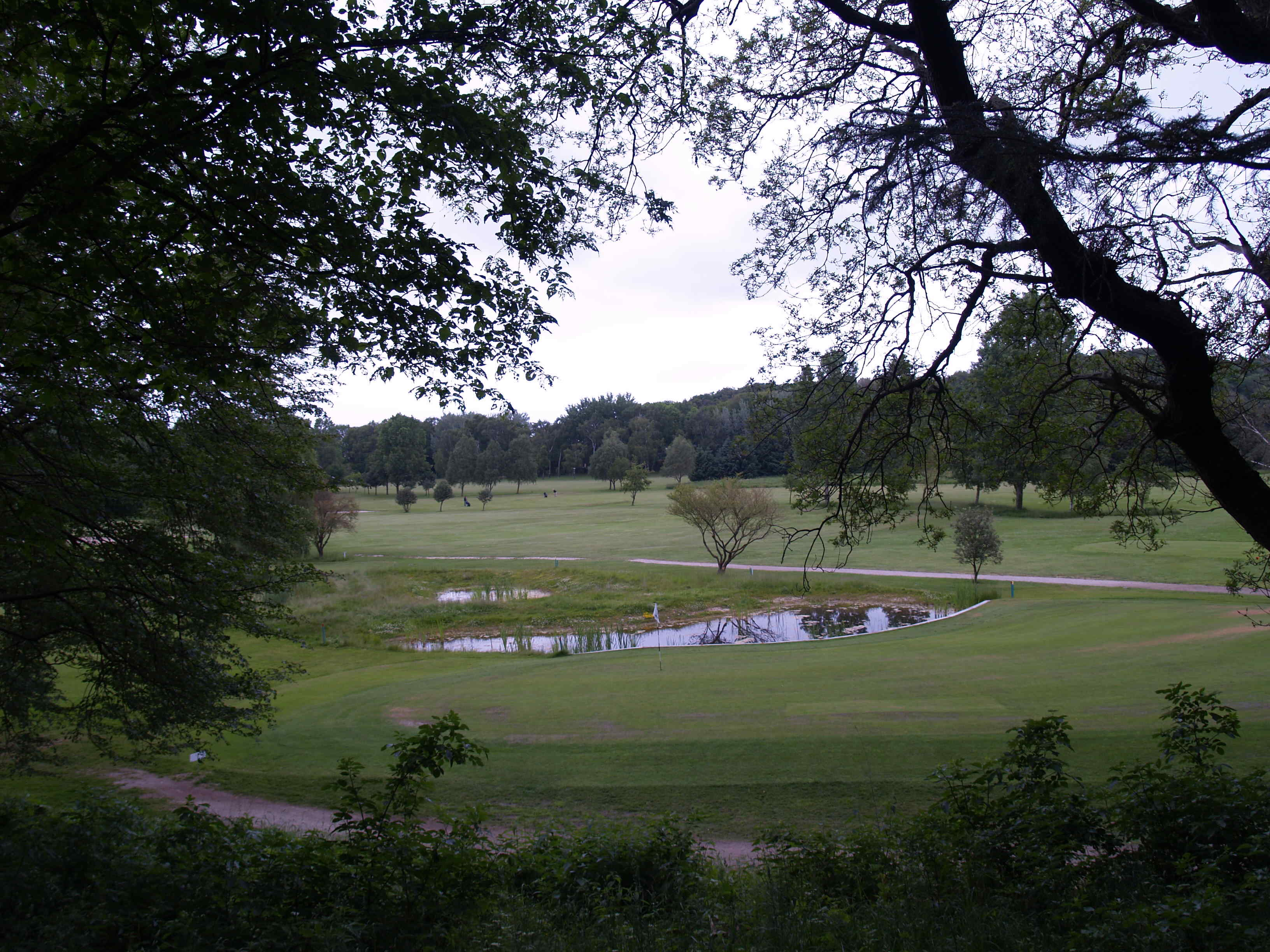 Blick auf ein Teil des Golfplatz von Korsør